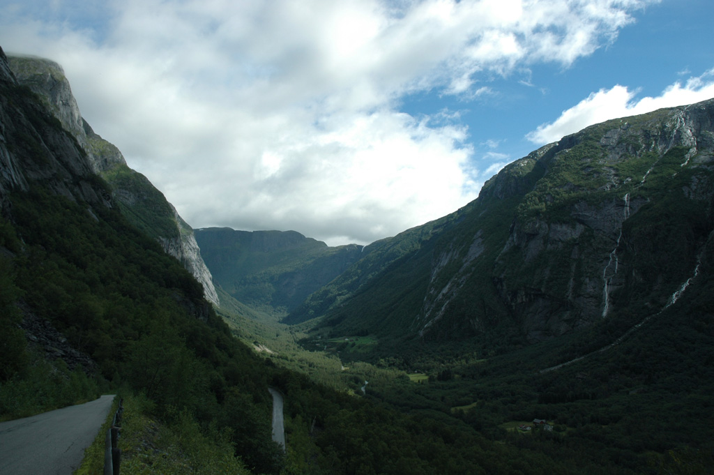 Simadalen sett frå vegen til Kjeåsen